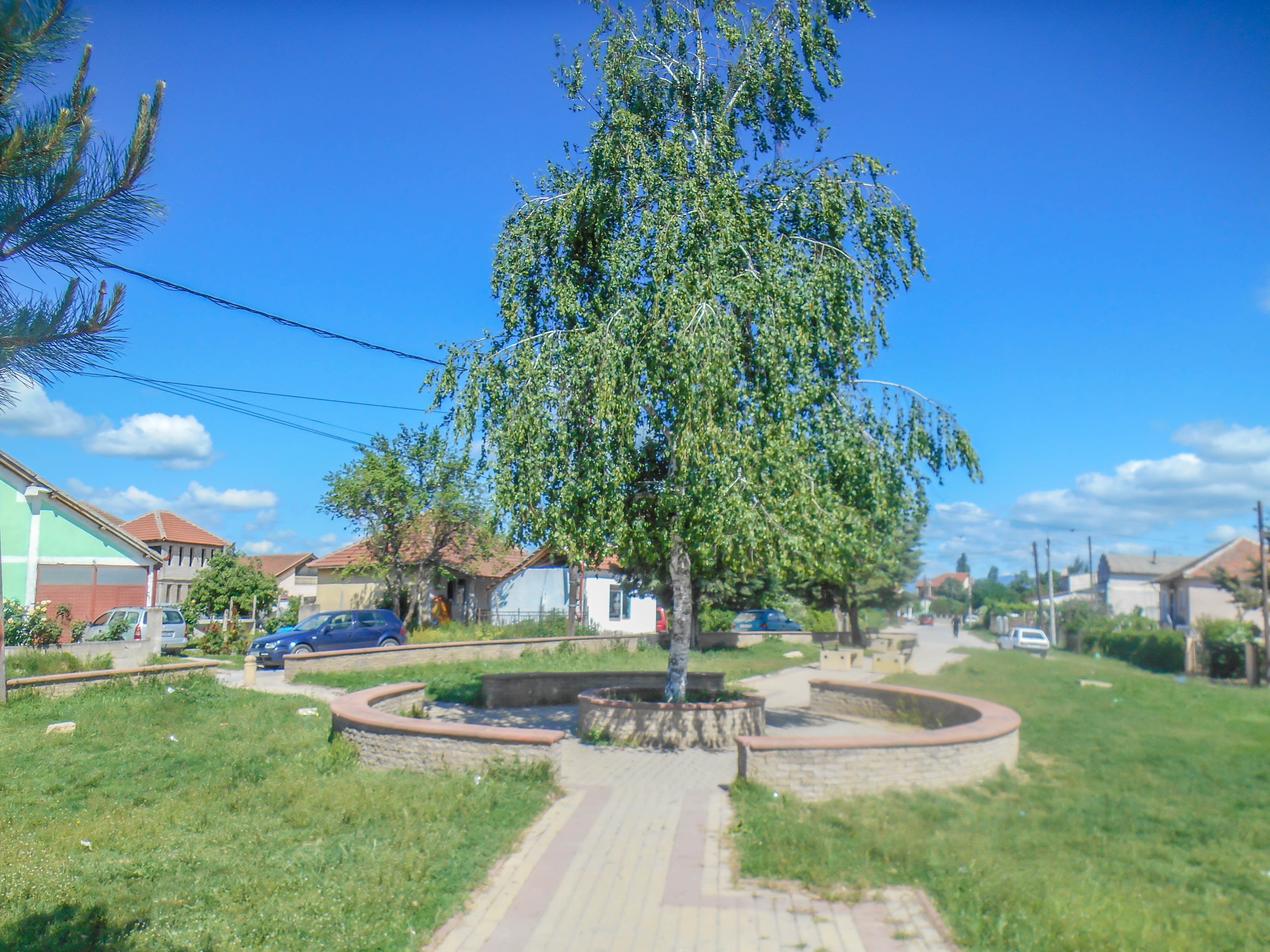 Детски парк - Василево